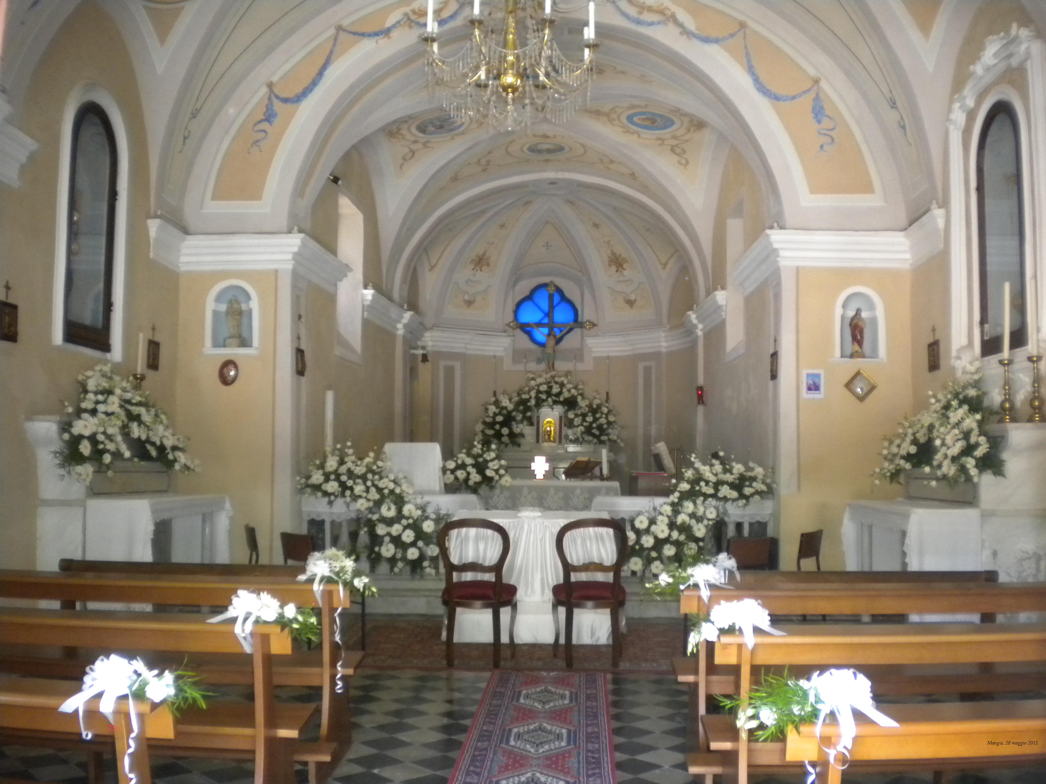 Interno della chiesa di Mangia